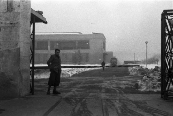 Italia Dopoguerra. Torino. Stabilimento Fiat Mirafiori. Cancello con guardia all'ingresso dello stabilimento.